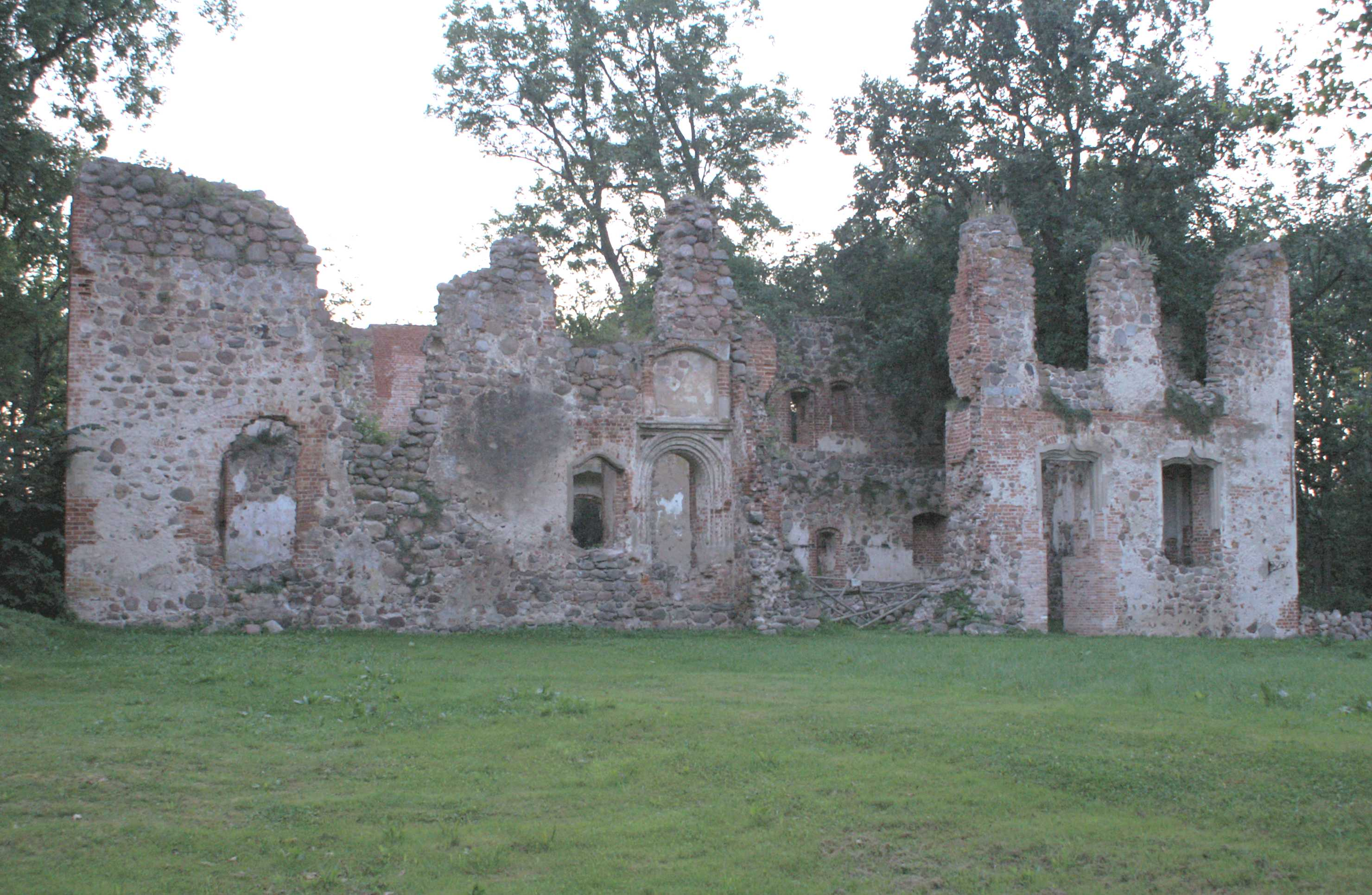 Putzar - Landkreis Ostvorpommern - Ulrichsbau - Ostseite